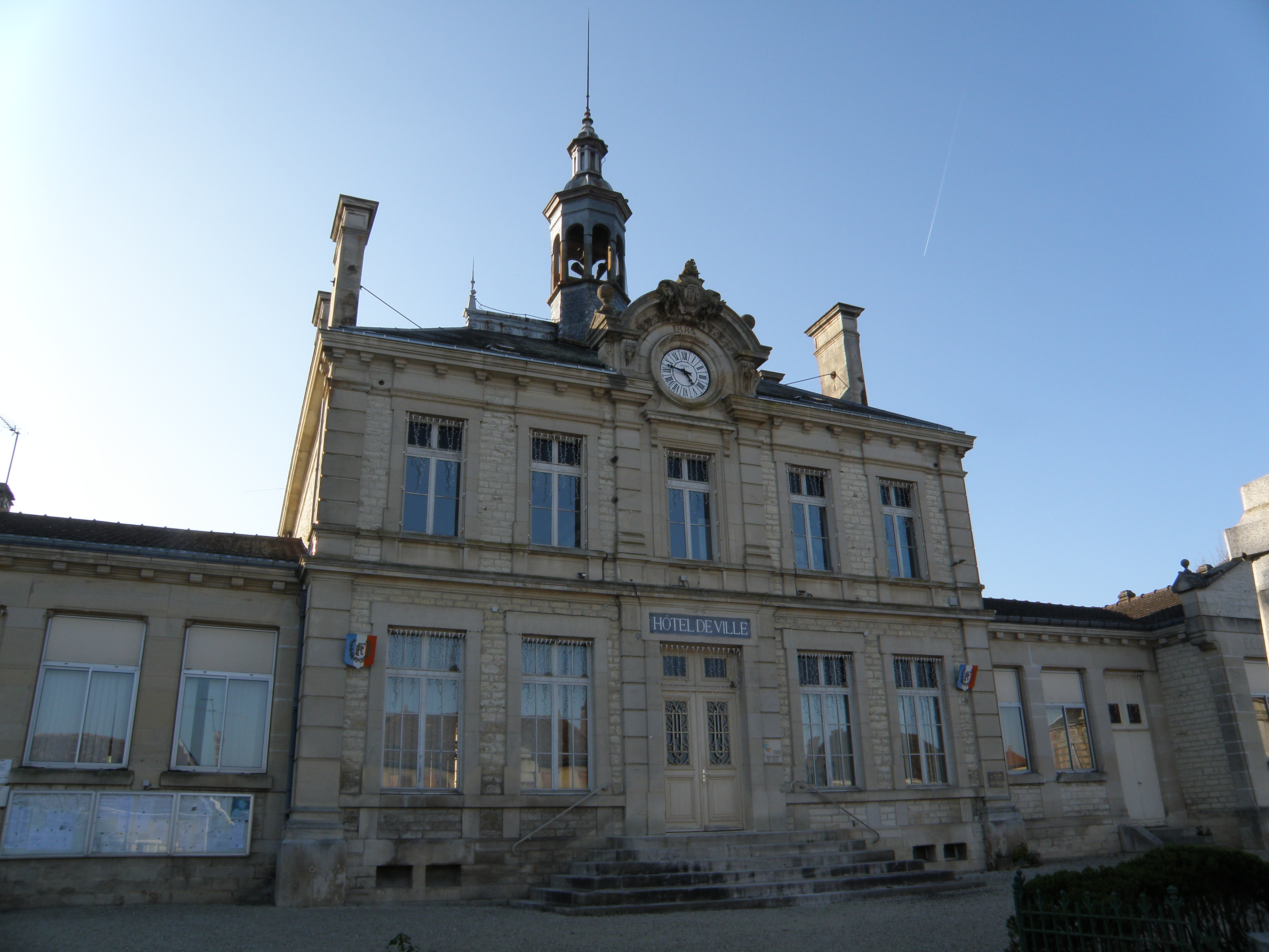 Hotel de ville. 10320 Bouilly